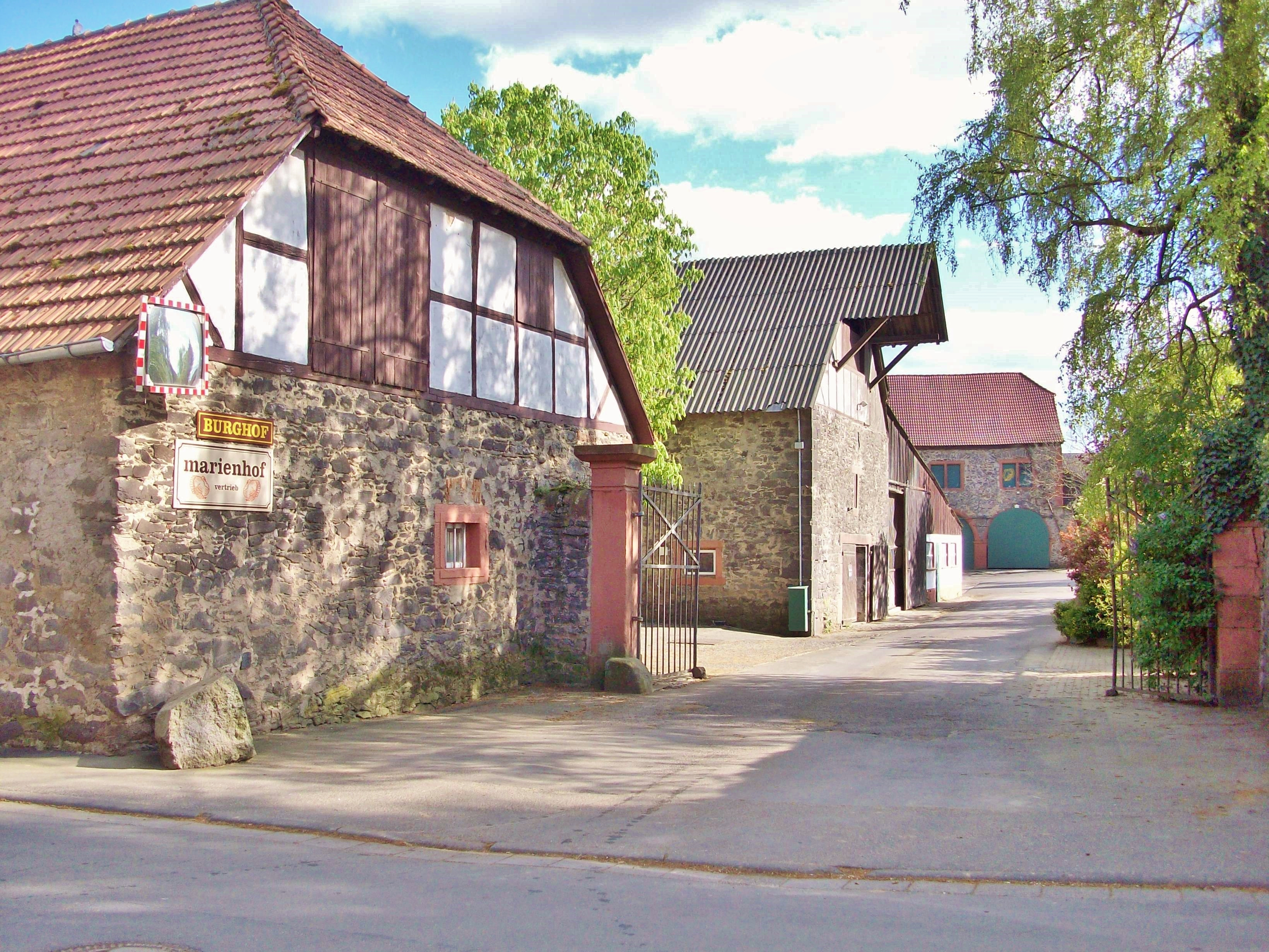 Eingang zur ehemaligen Wasserburg, genannt Oberburg (Bellersheim)